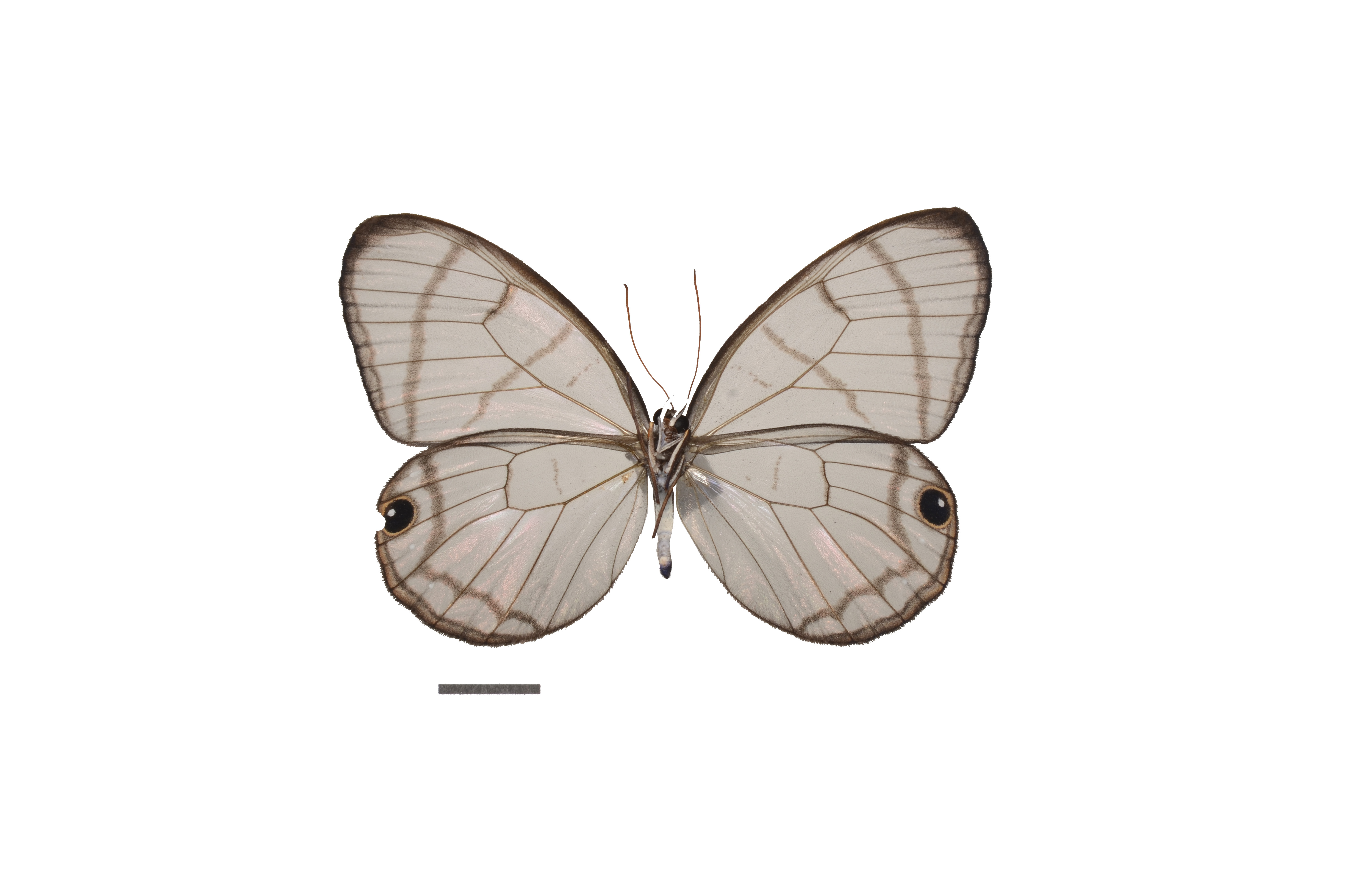 NE Costa Rica; ventral view